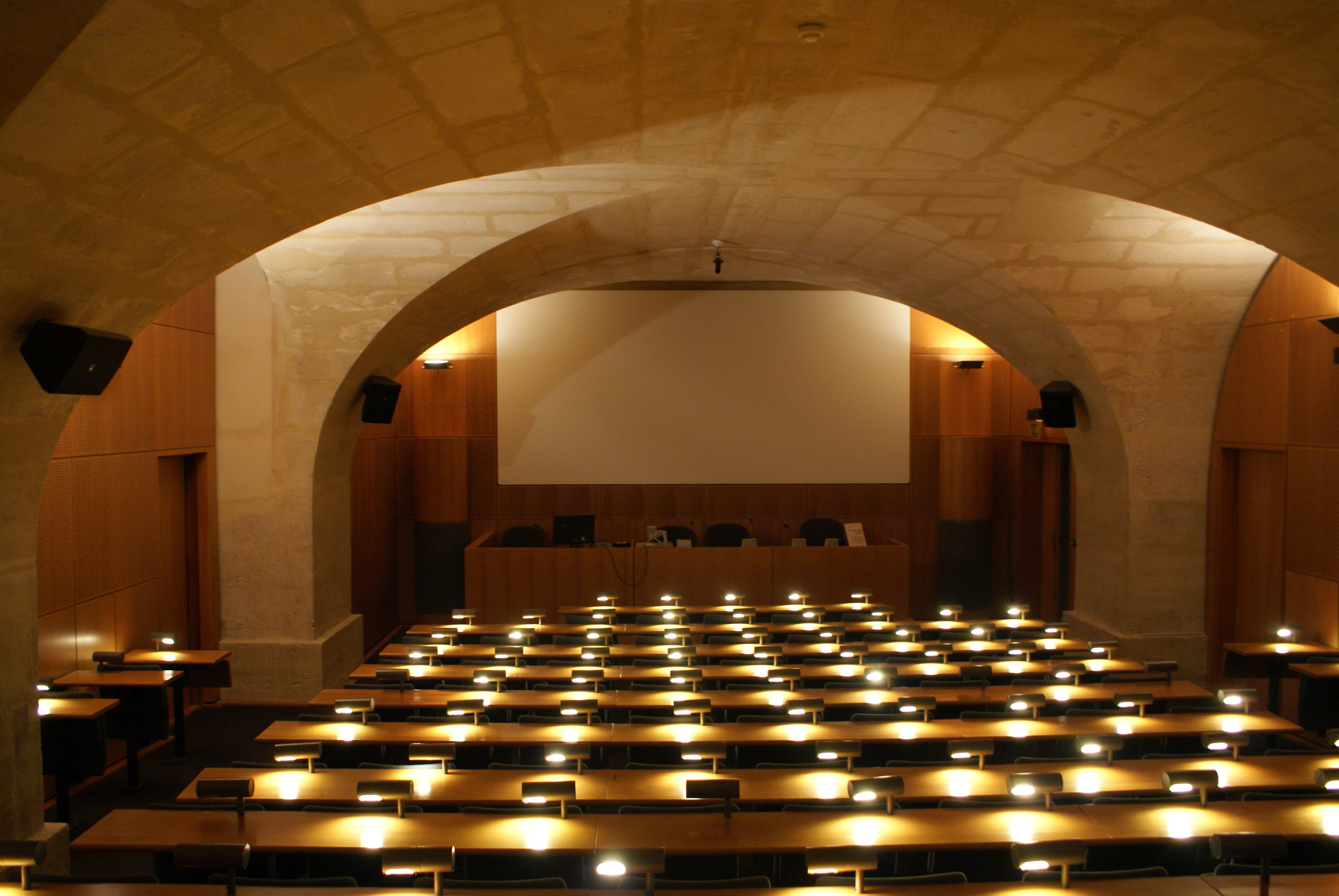 Amphithéâtre Dürer, Aile de Flore